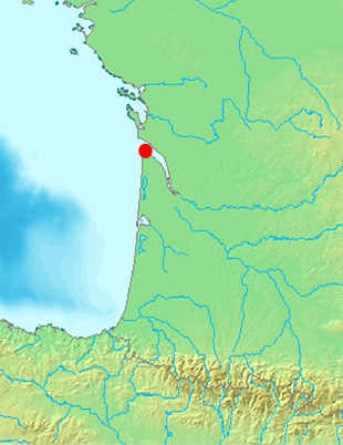 Carte du Sud Ouest de la France localisant la Pointe de Grave Licensing Catégorie:Carte Aquitaine